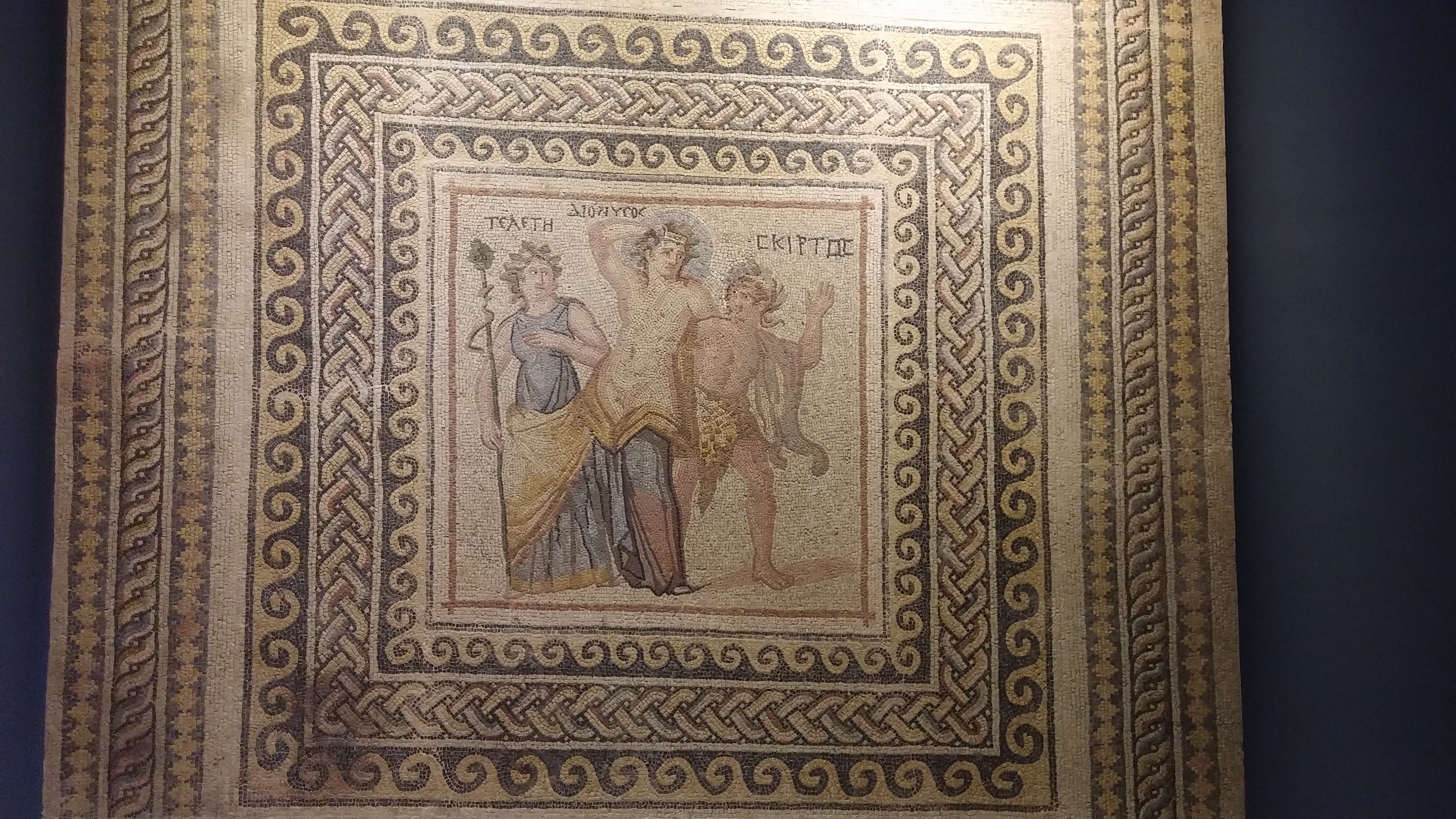 M.S. 2.-3. Yüzyıl